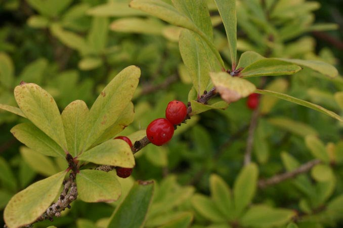 Daphne mezereum: Berries. Odder, 24.7.2005 Photographer: Sten Porse